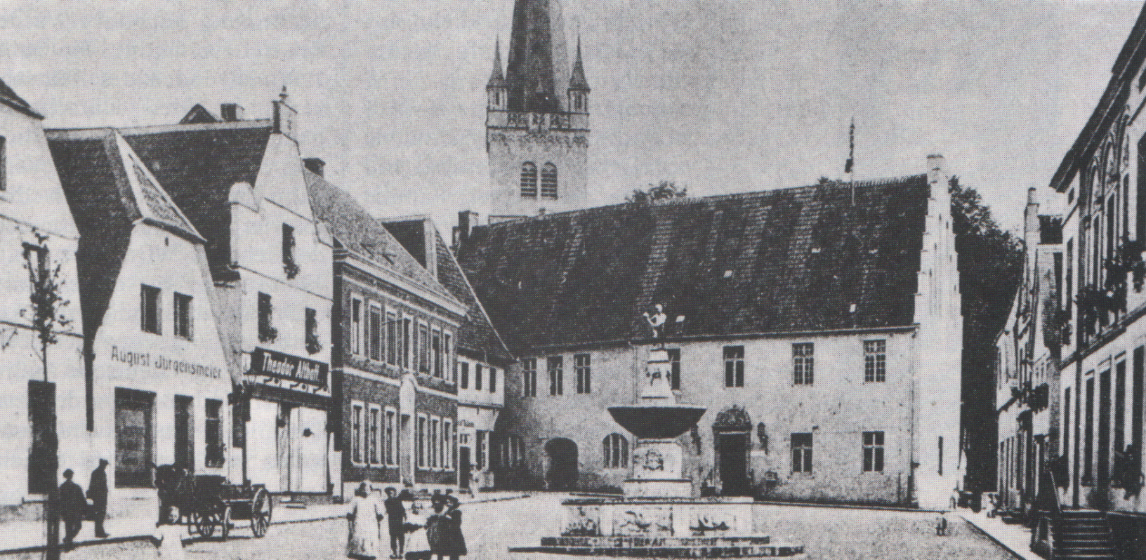 Dülmen, Marktplatz, um 1900. Die Häuser von links nach rechts: Das Haus von August Jürgensmeier mit seinem Ladenlokal und Werkstatt für Hüte, Mützen und Schirme („das Stammhaus in Dülmen“).Gegründet 1884 in der Marktstraße.1918 erneuter Umzug in eigenes Haus Marktplatz/Ecke Viktorstraße. Dort befand sich, jetzt mit dem Schwerpunkt Kürschnerei und Verkauf von Pelzwaren, der Laden, neben weiteren Geschäftsstellen, noch 1984, zu seinem 100-jährigen Jubiläum. Theodor Althoff (Ursprung der Karstadt-Kaufhäuser) zwei (unbekannte) Häuser Rathaus